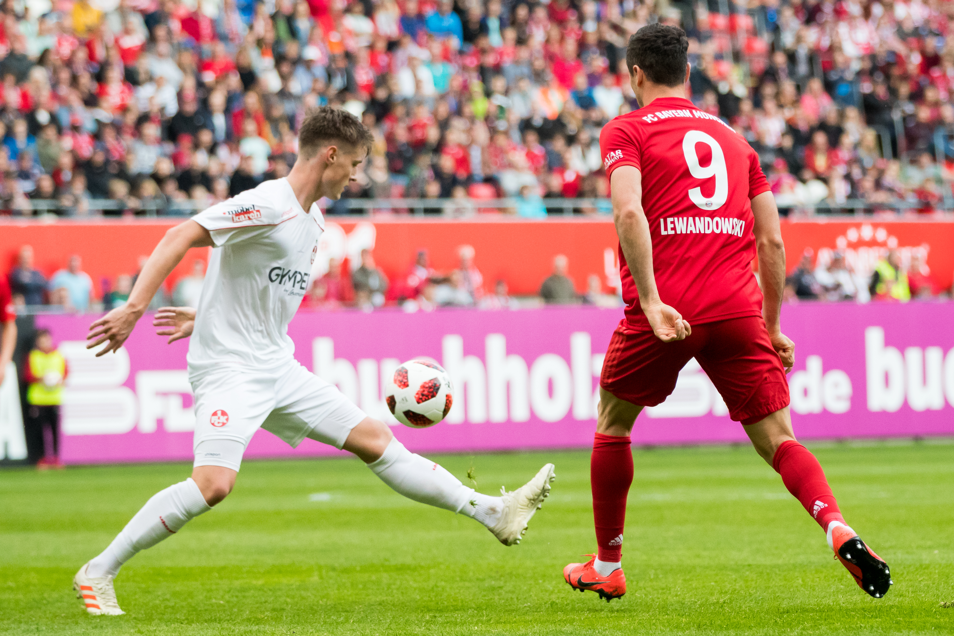 during 1.FC Kaiserslautern vs FC Bayern München at Fritz-Walter-Stadion, Kaiserslautern, Rheinland-Pfalz, Germany on 2019-05-27, Photo: Sven Mandel